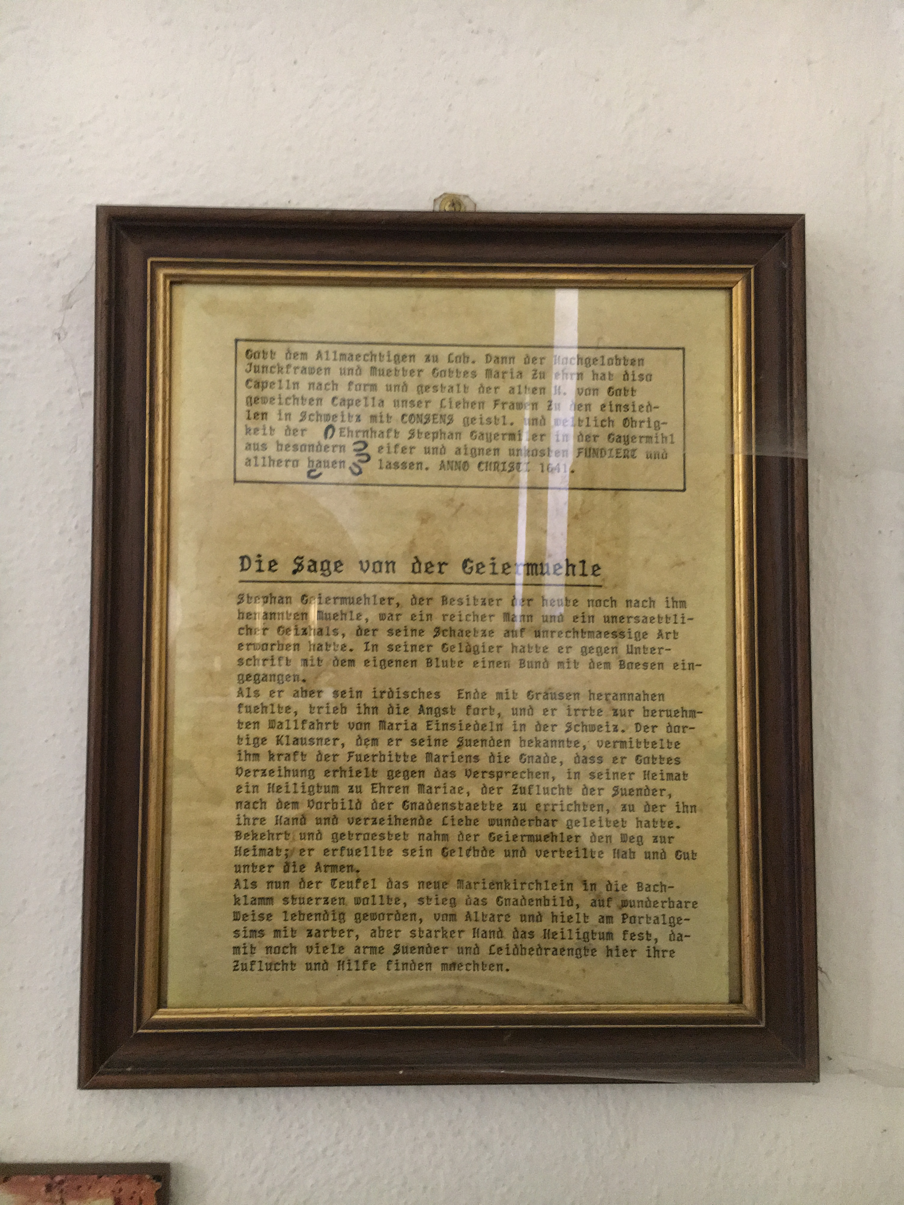 Der Müller Stefan Geier, der Erbauer, war zu Zeiten des Dreißigjährigen Krieges ein wohlhabender Mann. Allerdings nahm er es mit der Ehrlichkeit nicht sehr genau. Er betrog seine Kunden und schloss mit dem Höllenfürsten Satan einen Geheimbund. Er durfte dem Teufel keine Seele entreißen, er sollte ihm vielmehr Menschen zuführen. Im Gegenzug erhielt der Müller ein Schwarzbuch, mit dessen Hilfe er sich den Satan zum Diener machen konnte. Sollte Geier den Pakt brechen, wäre seine Seele dem Teufel ausgeliefert. Im Jahr 1640 fand der Sohn des Müllers das Schwarzbuch. Er benutzte es unwissend und wurde von Vögeln angegriffen. Der Müller rettete seinen Sohn, hatte dem Teufel aber damit eine Seele entrissen. Er hatte den Pakt gebrochen und sollte in einem Jahr selbst dem Teufel gehören. Der Müller war verzweifelt, streifte in den Wäldern umher und stieß auf einen Einsiedler, dessen Rat er schließlich befolgte. Er gab sein unrechtes Gut zurück und ließ von seinem rechtmäßig erworbenen Eigentum neben seiner Mühle eine Kapelle zu Ehren Mariens als Zuflucht für Sünder erbauen. In der fraglichen Nacht betete er in der Kapelle, während draußen der Satan und Maria um ihn kämpften. Der Teufel wollte die Kirche in den Dettenbach stoßen, aber Maria hielt sie mit ihren Händen fest. Geier und seine Nachkommen stifteten mehrere Gottesdienste und ihr rechtschaffenes Vermögen wirkte lange über ihren Tod hinaus. Über dem Kircheneingang sieht man heute noch fünf Vertiefungen in einem Stein, in die gerade die fünf Finger einer Hand passen. Quelle